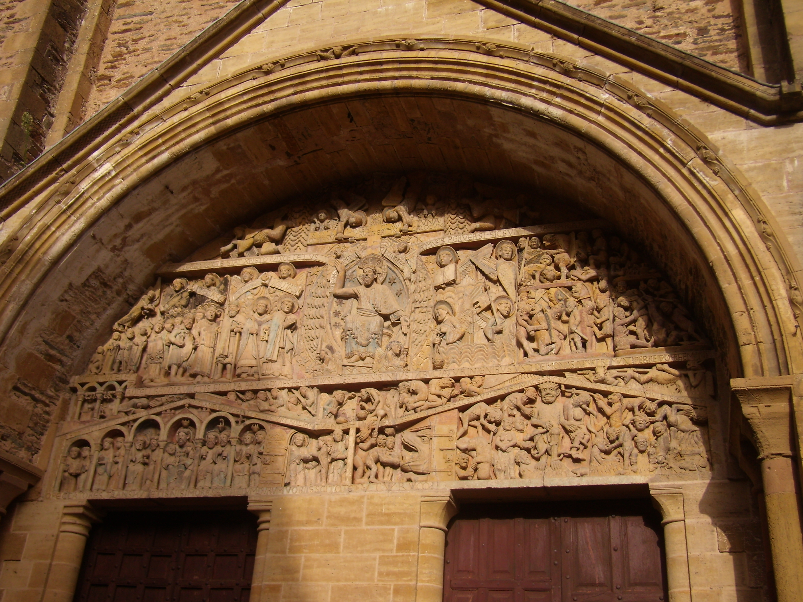 Lunetta del portale dellc chiesa abbaziale di St. Foy, Conques, Francia